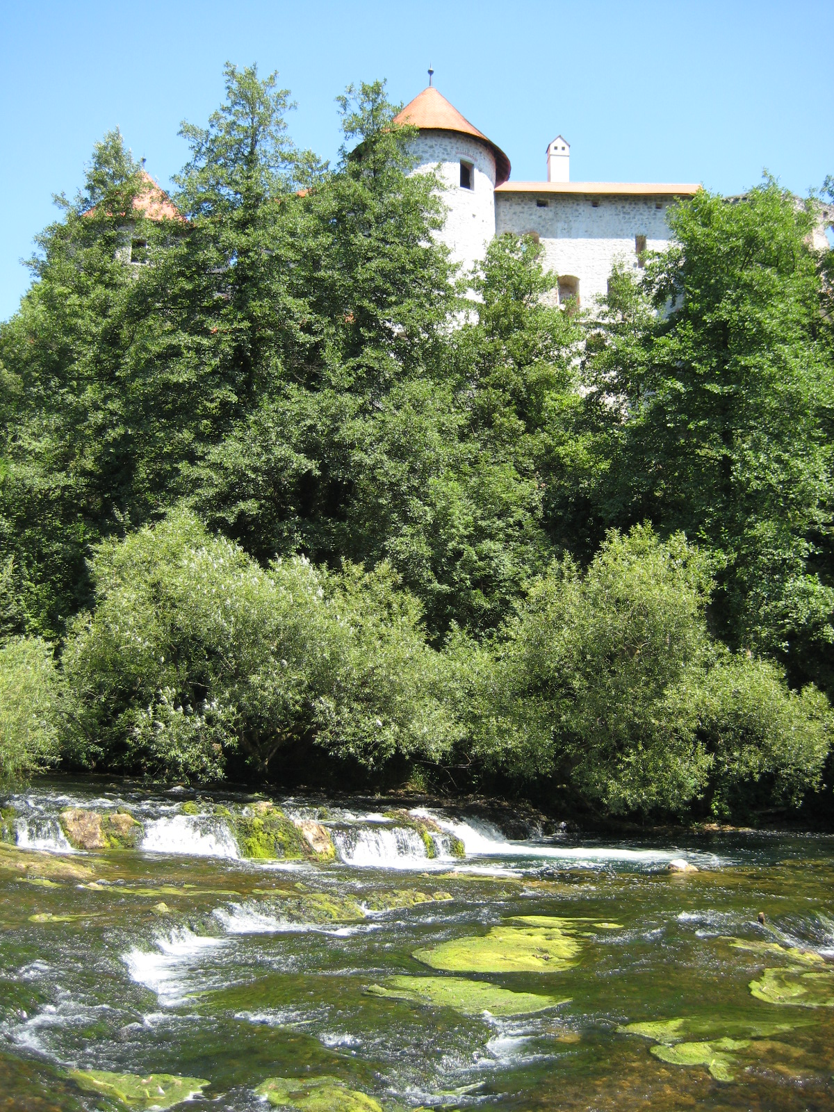 Žužemberk castle, Slovenia